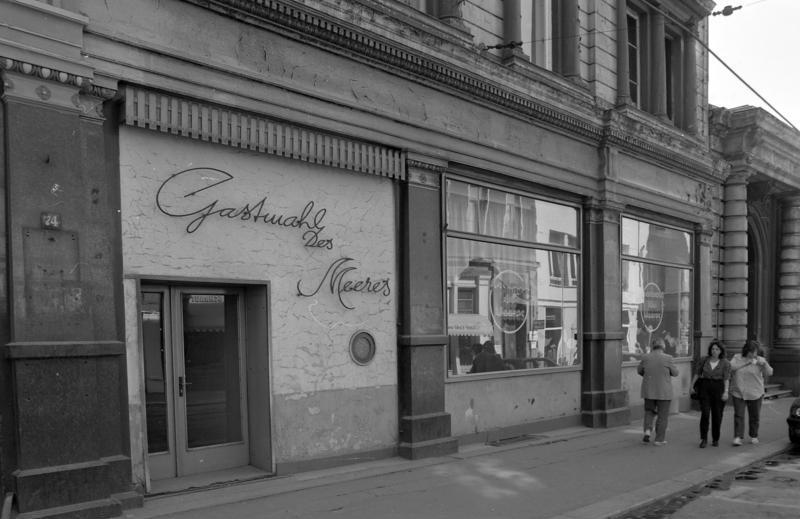 11.-18.8.1991 Bundesland Sachsen-Anhalt Halle Häuser mit DDR-typischen Schildern